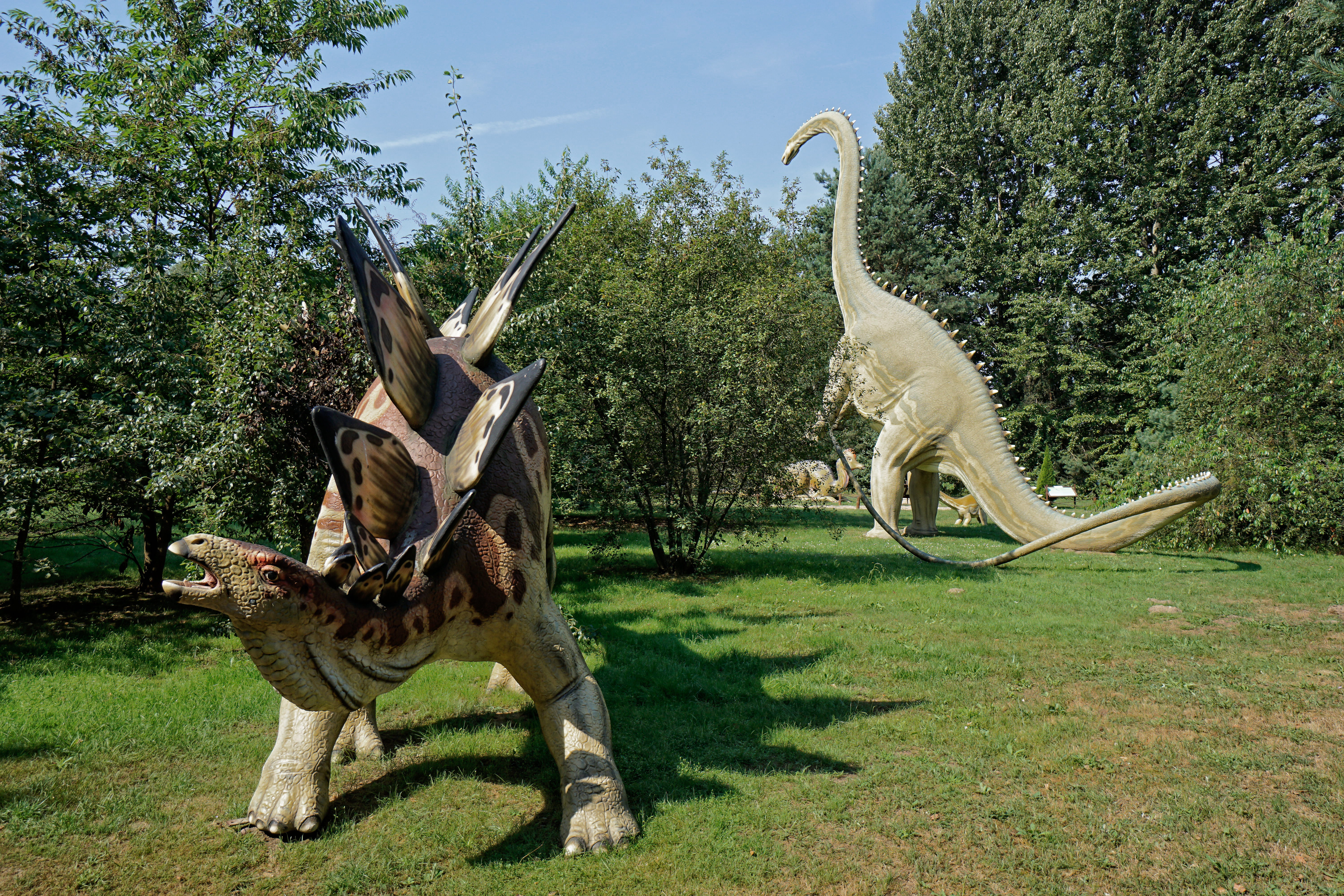 Dinozaury w Parku Jurajskim w Jurowcach